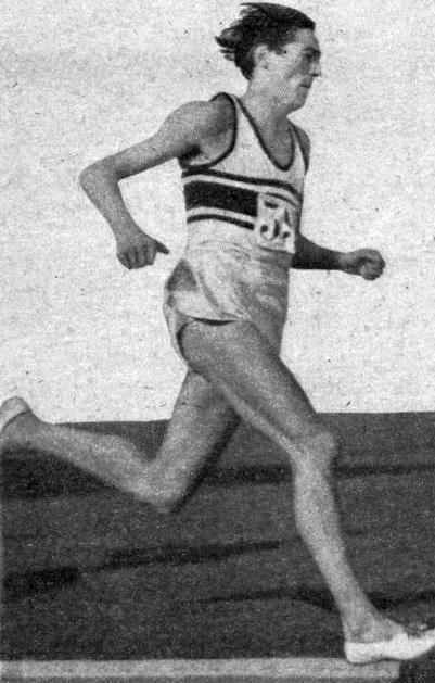 Marcel Hansenne en 1945.